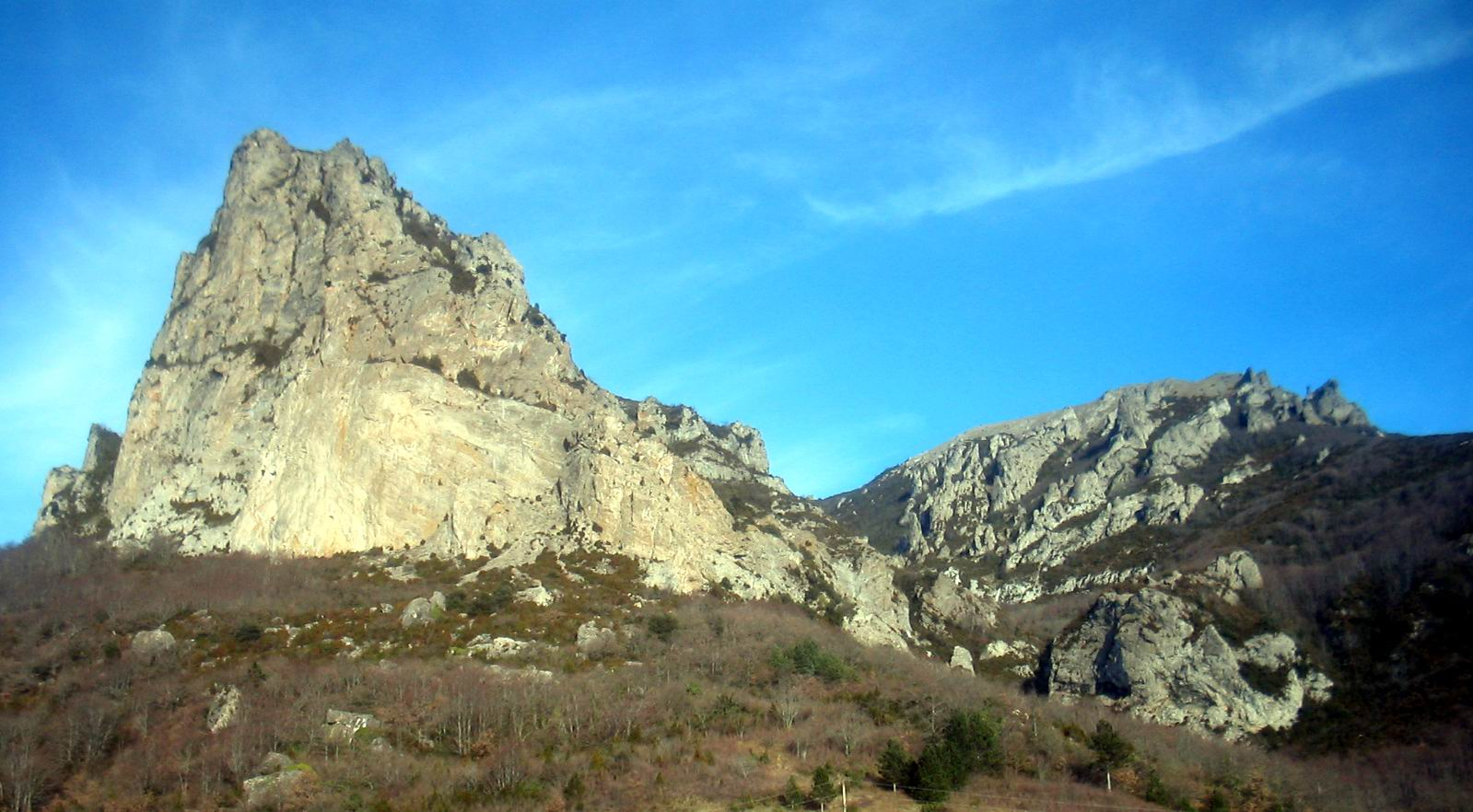 Pic de Bugarach versant Sud